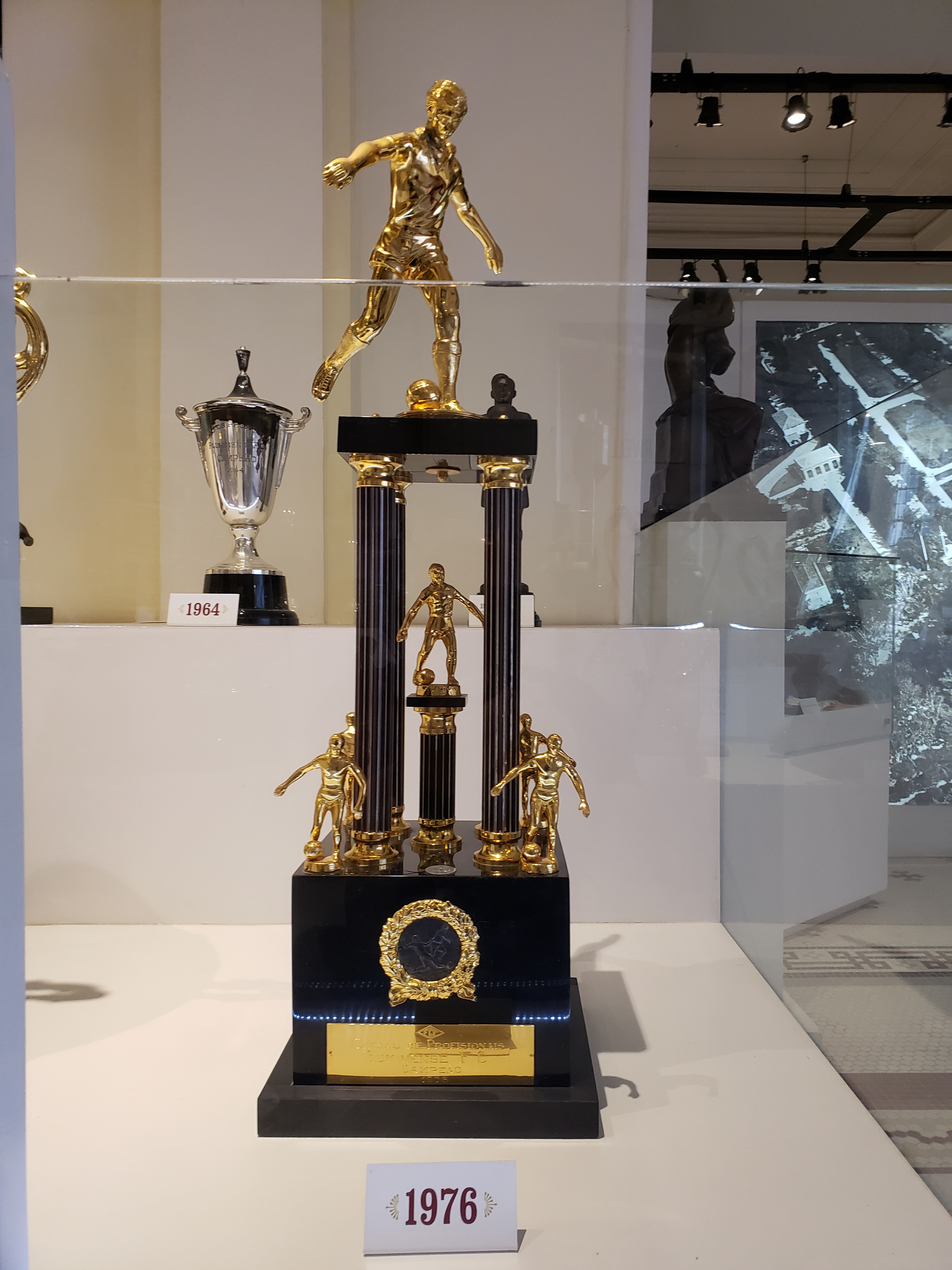 Taça do Campeonato Carioca de Futebol de 1976, conquistado pelo Fluminense Football Club contra o Vasco da Gama.